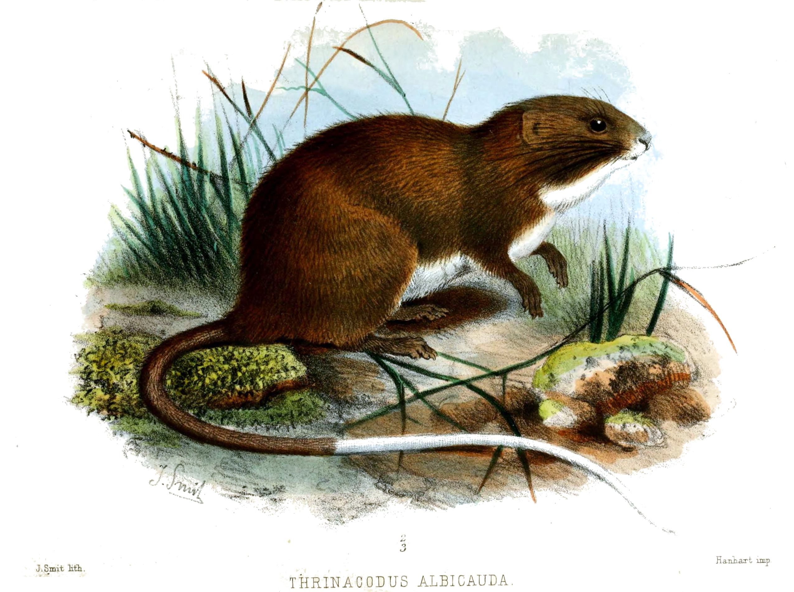 Thrinacodus albicauda = Olallamys albicauda